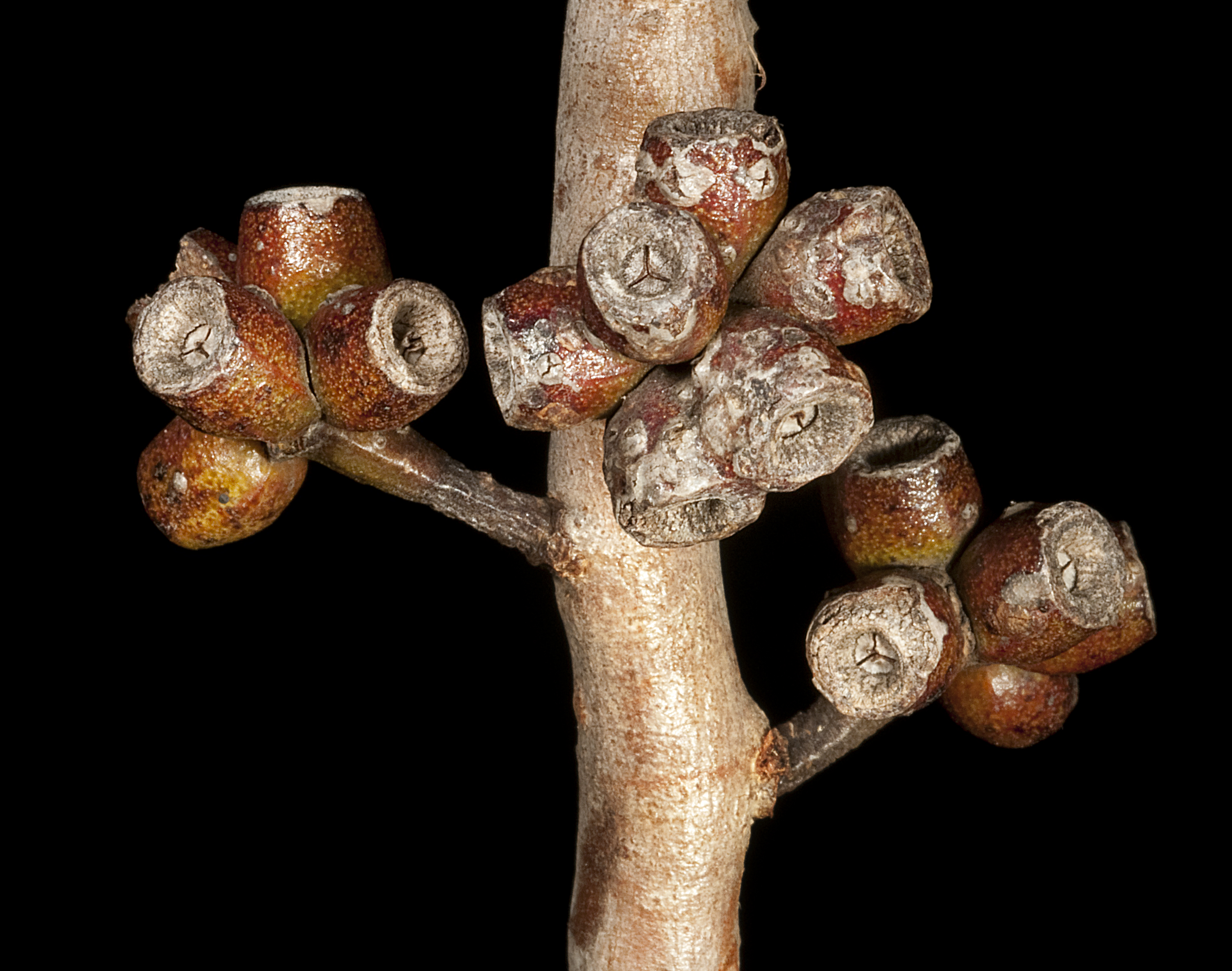 KRT4042